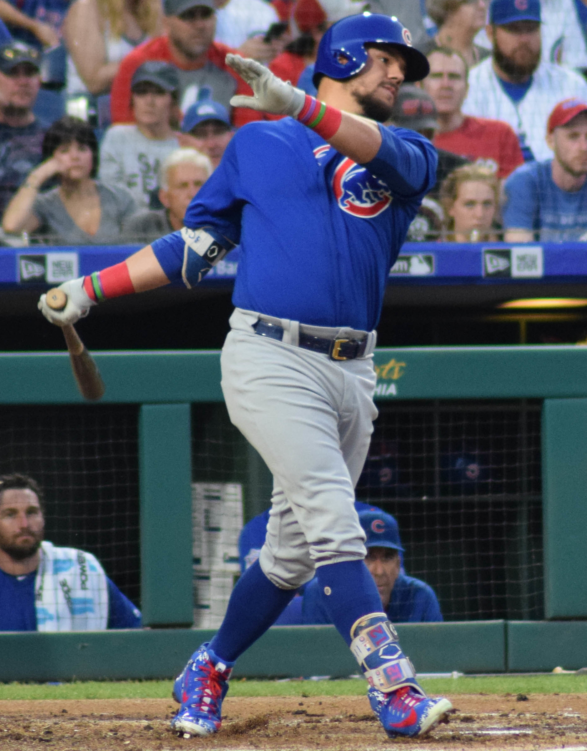 Kyle Schwarber